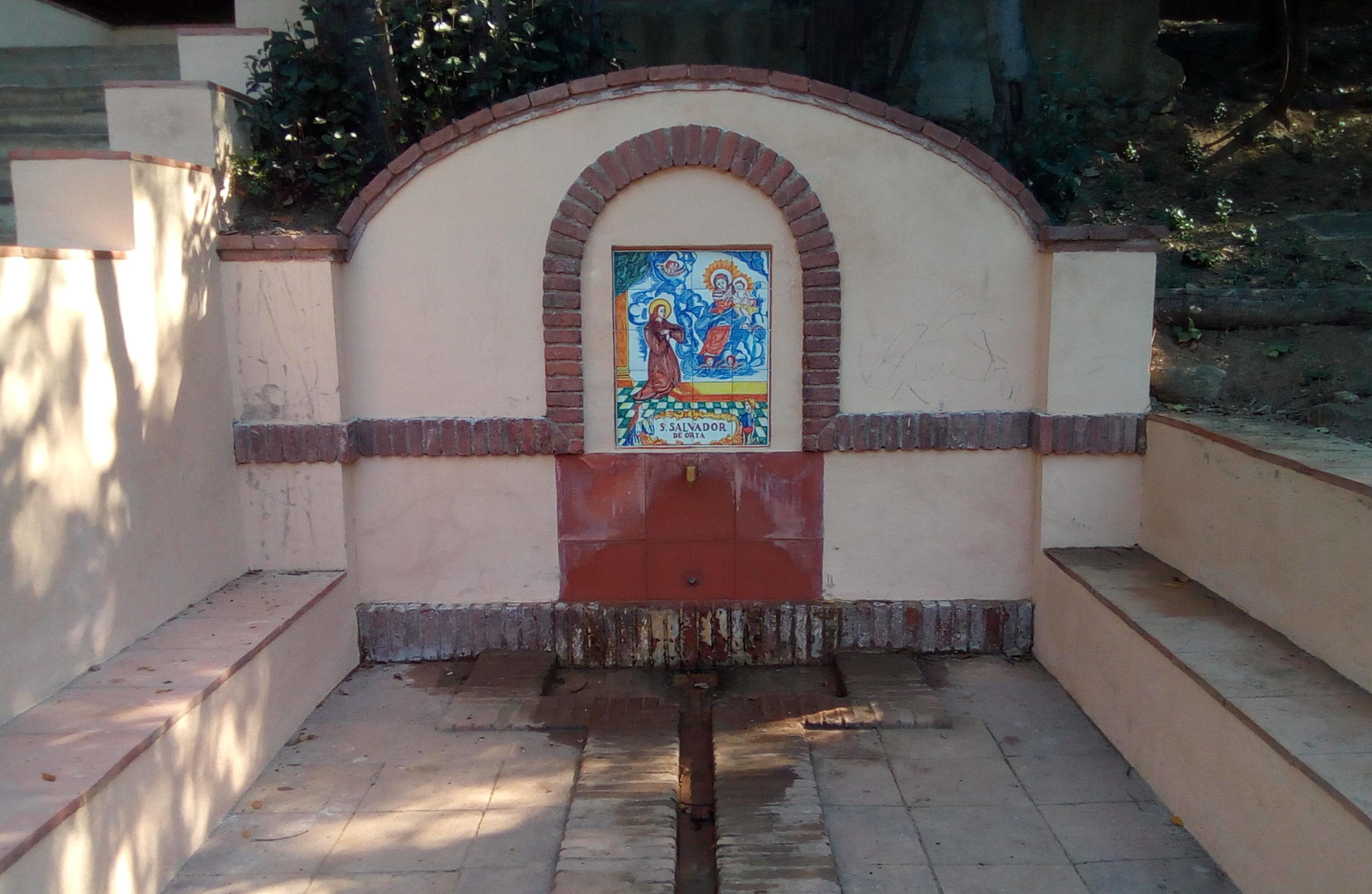 Fuente de San Salvador, parque Güell.